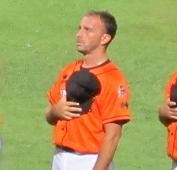 Filippo "Pippo" Crociati prima del match contro la T&A San Marino, gara 4 della serie scudetto 2012.